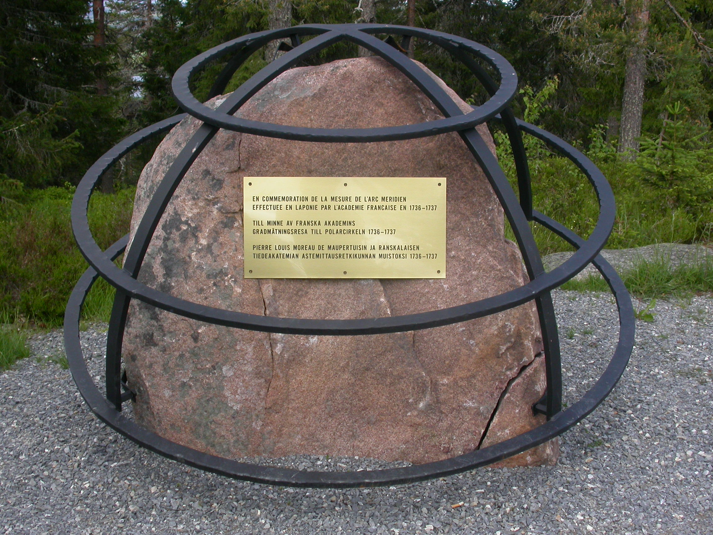 Monument in Aavasaksa, Finland.